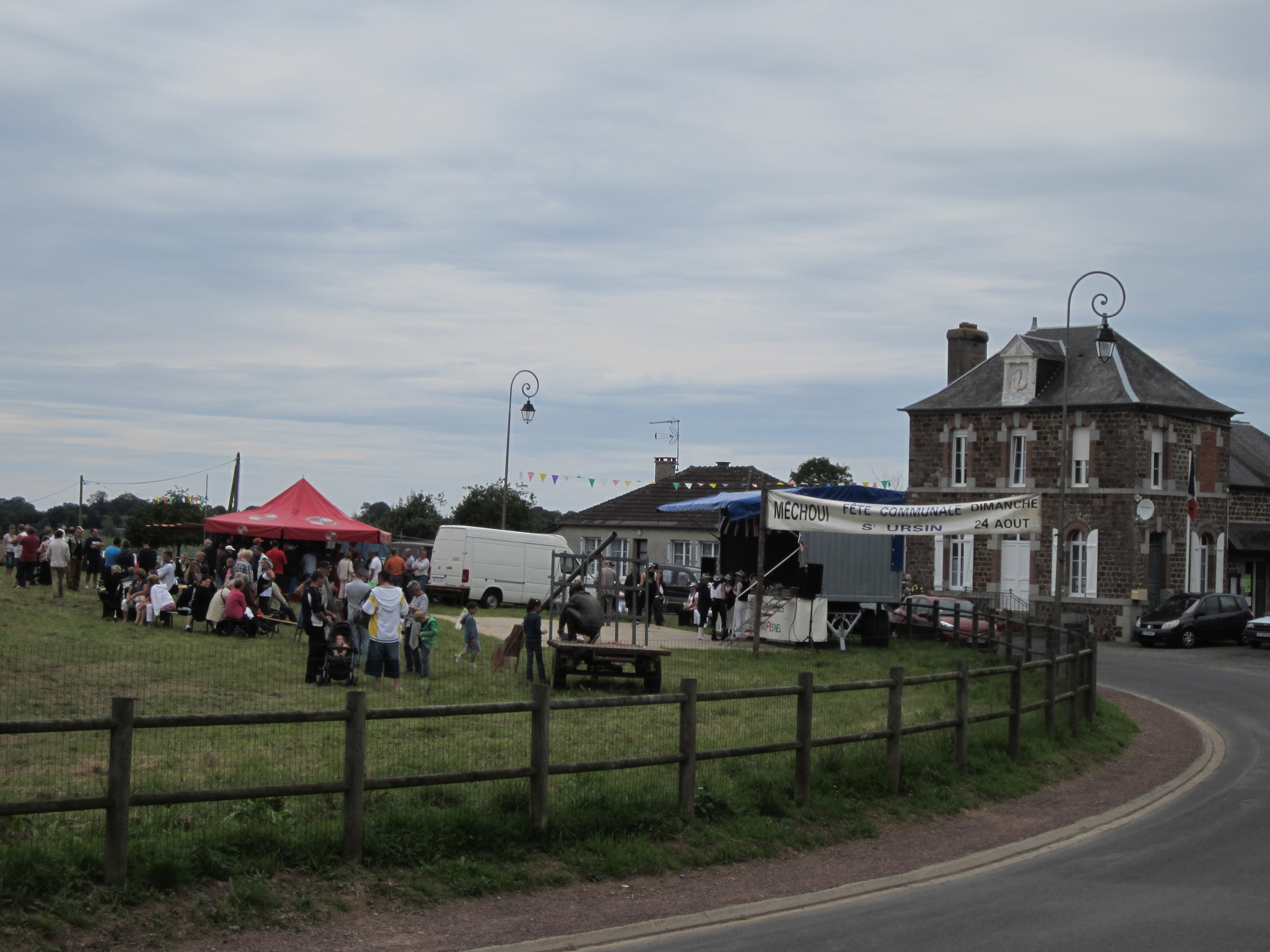 Saint-Ursin, Saint-Jean-des-Champs, Manche